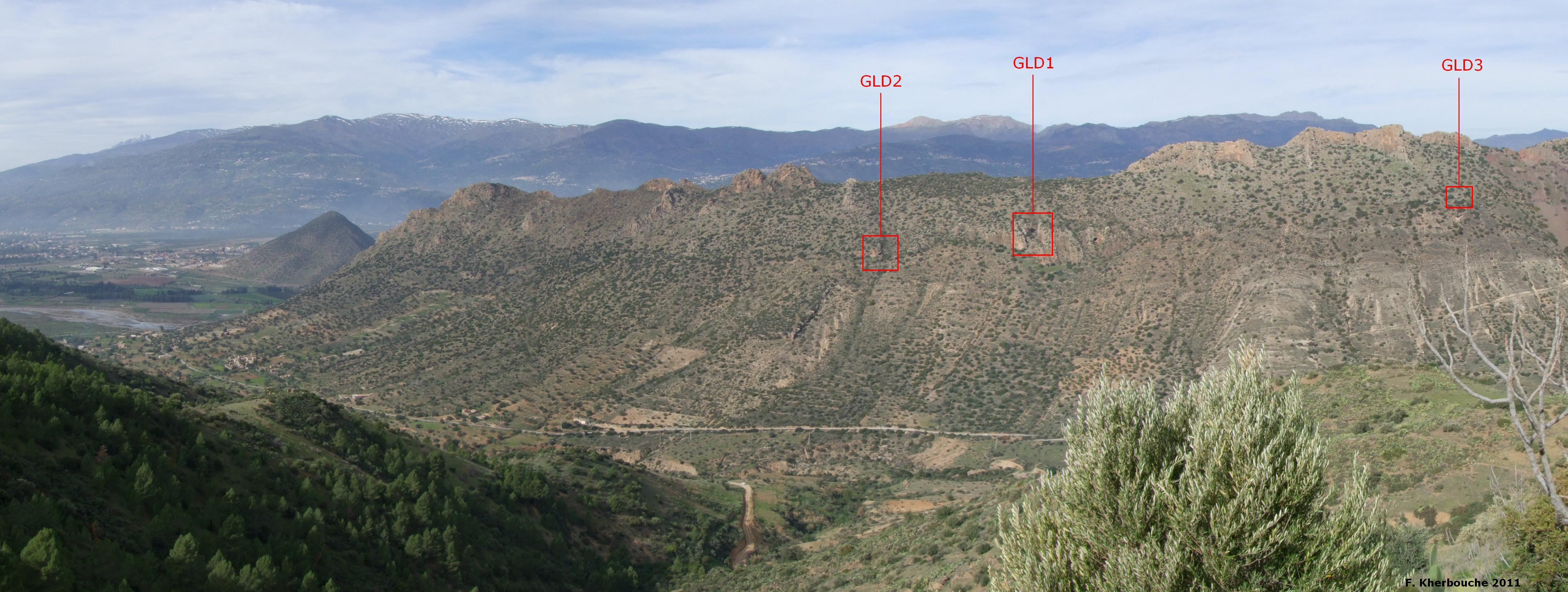 Position des grottes préhistoriques de Gueldman